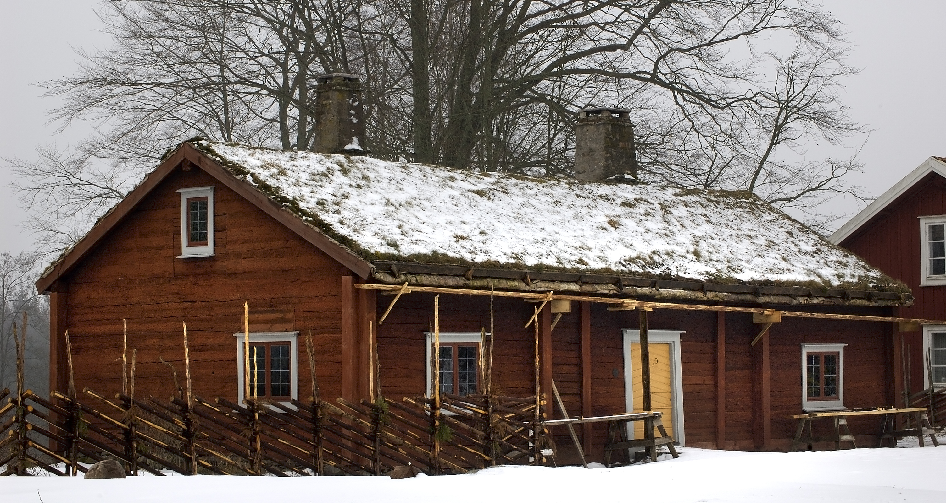 House in Råshult, Kronobergs län, Sweden